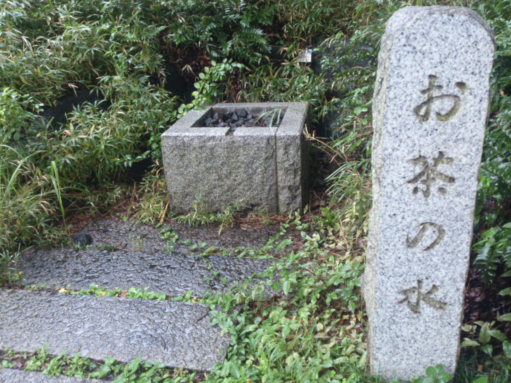 千葉市中央区にある史跡